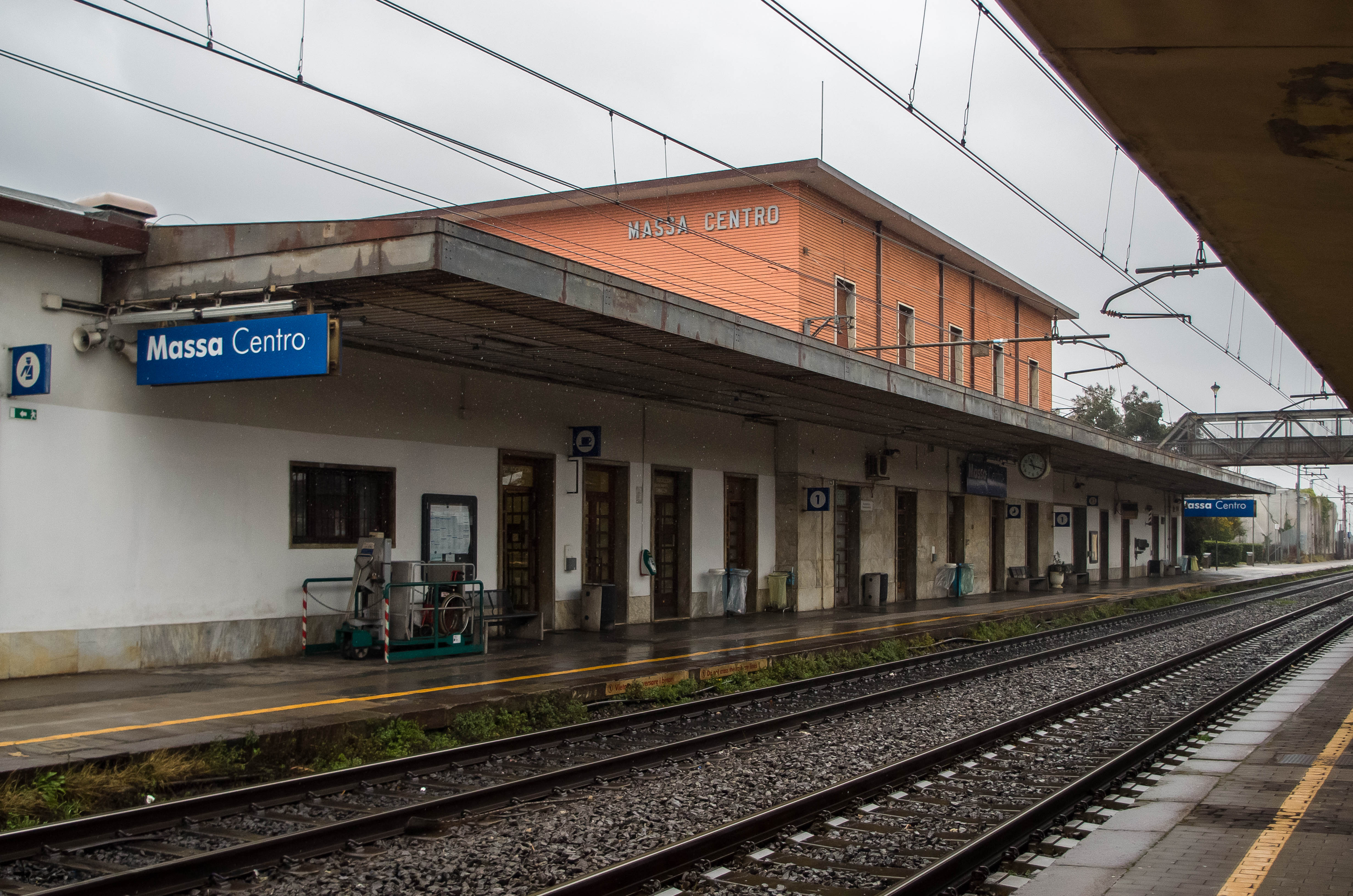 Il F.V. della stazione di Massa Centro durante una fredda e piovosa giornata di fine gennaio.